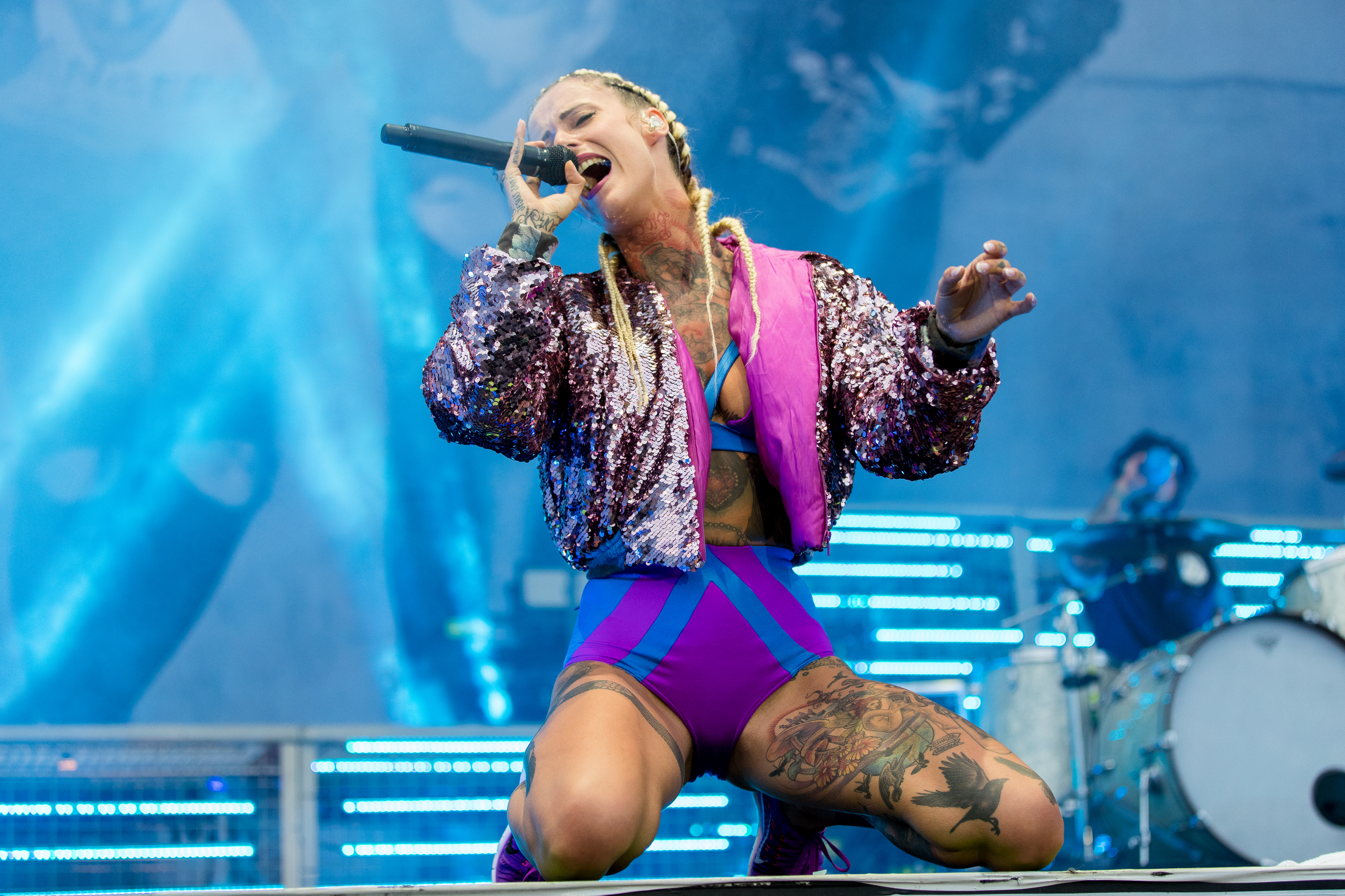 Jennifer Rostock during Rocco del Schlacko 2016 at , Püttlingen, Saarland, Germany on 2016-08-12, Photo: Sven Mandel